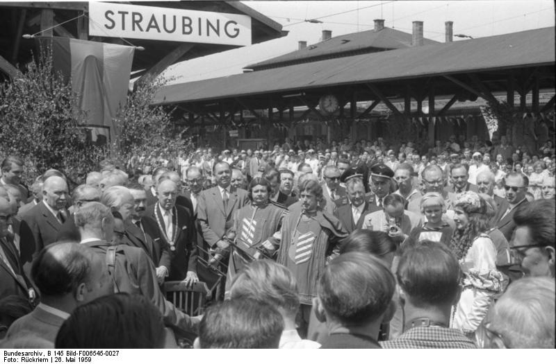 Straubing/Plattling: Die Festgäste werden durch die Oberbürgermeister und Landräte begrüsst